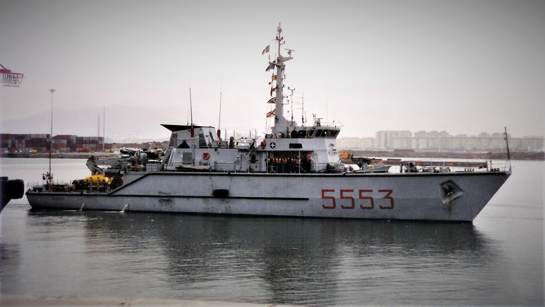 Il cacciamine Vieste